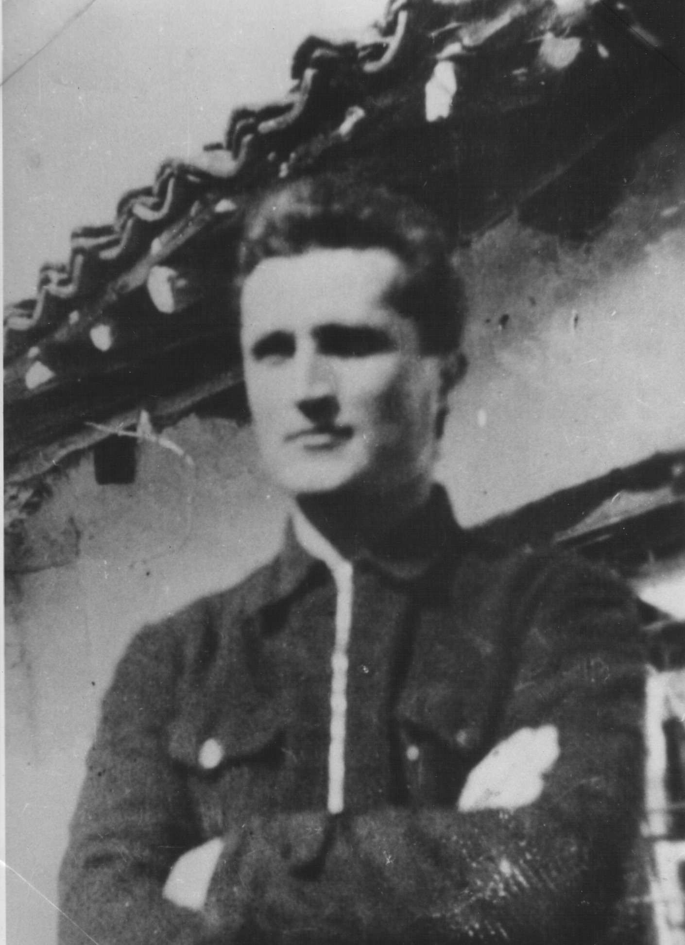 Srpskohrvatski / српскохрватски: Narodni heroj Ramiz Sadiku